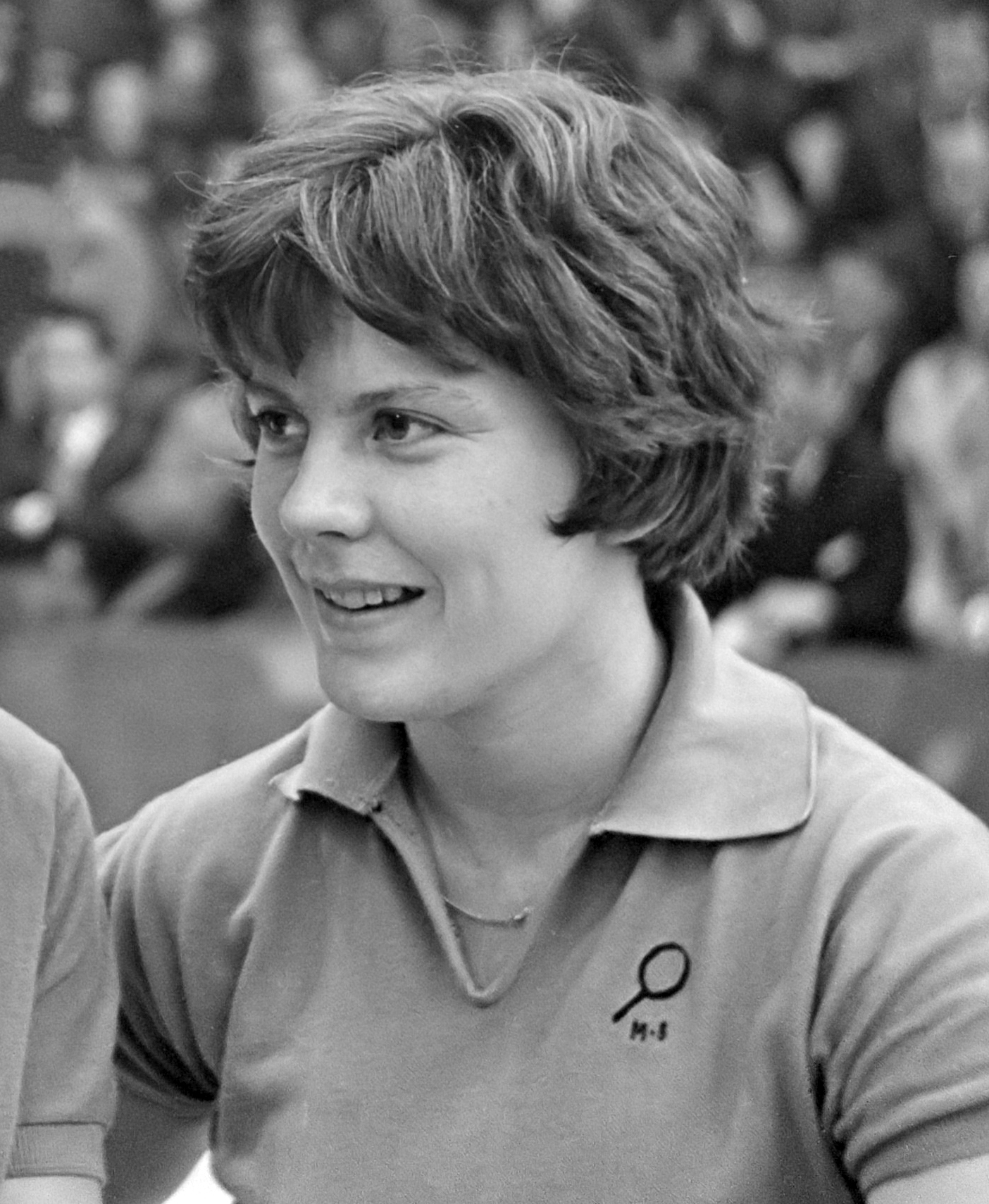 Tafeltenniskampioenschappen in Utrecht. Internationaal toernooi mejuffrouw Shannon